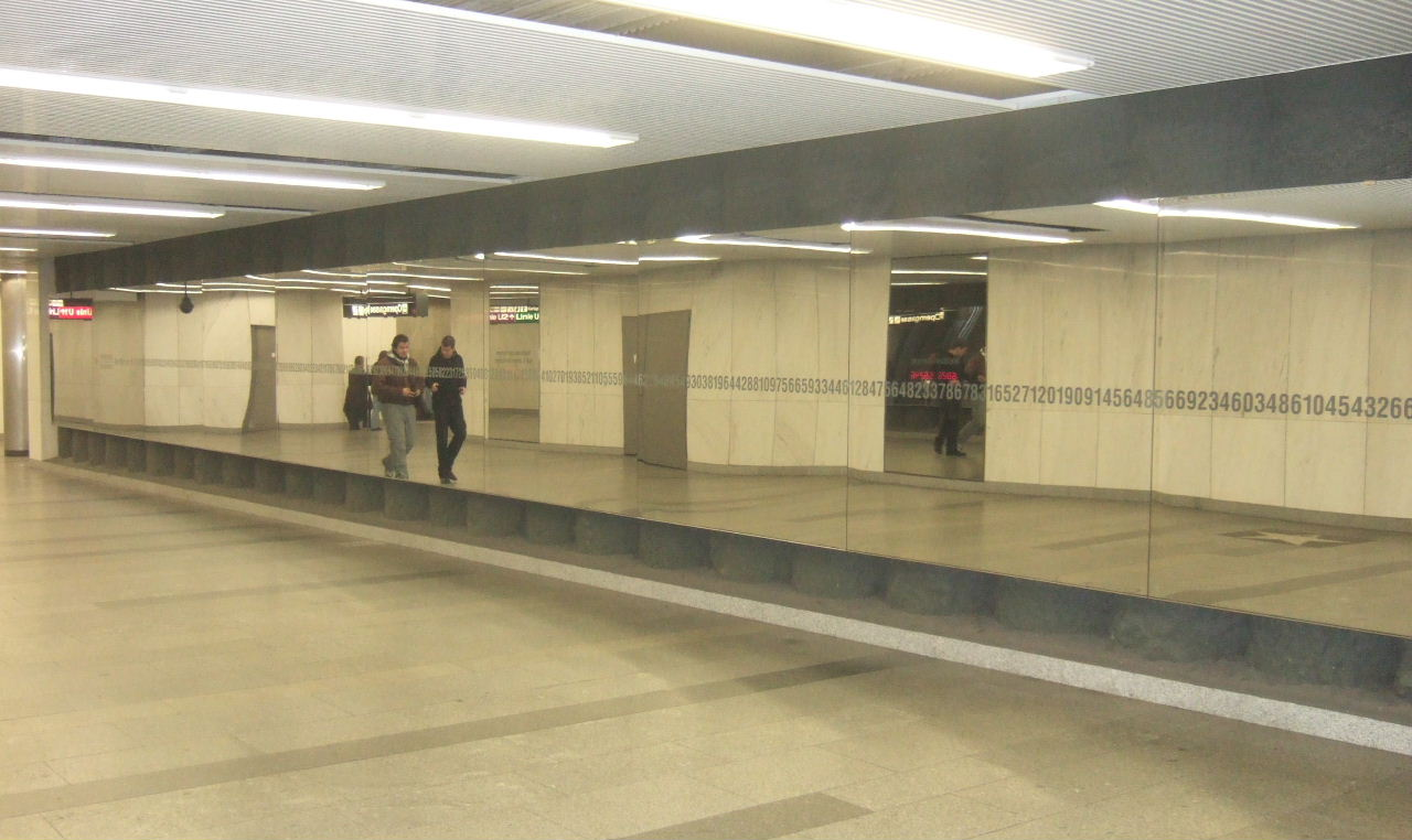 Ken Lum: Pi - Medieninstallation in der Wiener Opernpassage